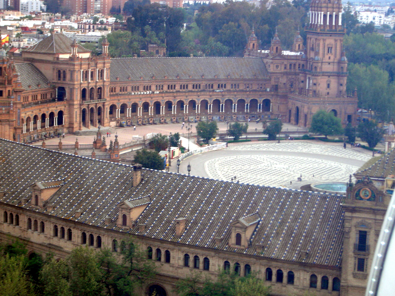 Plaza de España, Sevilla, Luftaufnahme